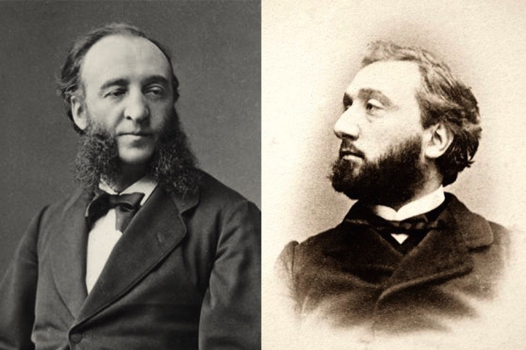 Portraits de Jules Ferry et Léon Gambetta